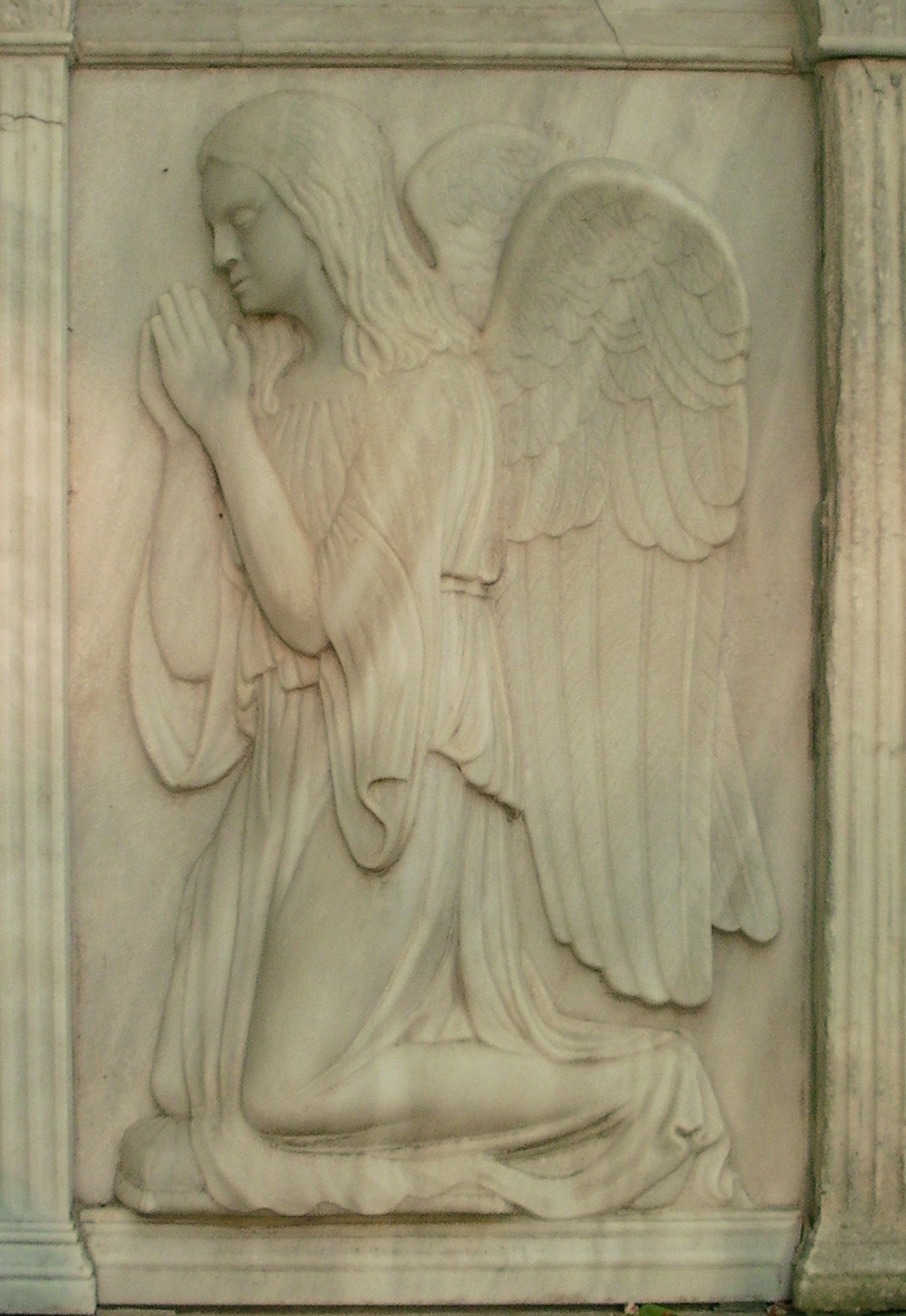 Grabmal von Georg Wilding, Fürst von Butera Radali, Detail (Gartenfriedhof Hannover)